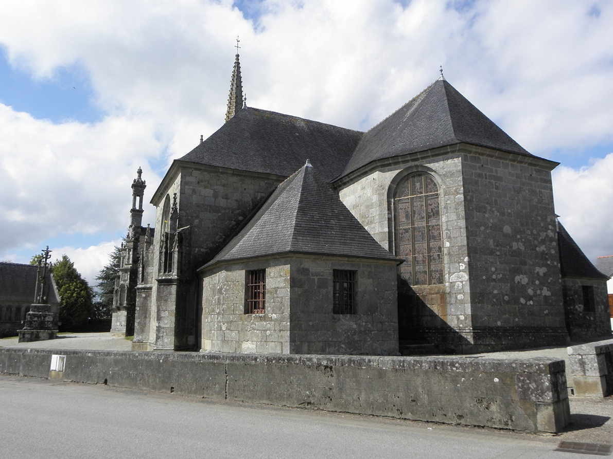 Chevet de l'église Notre-Dame et Saint-Tugen de Brasparts (29).